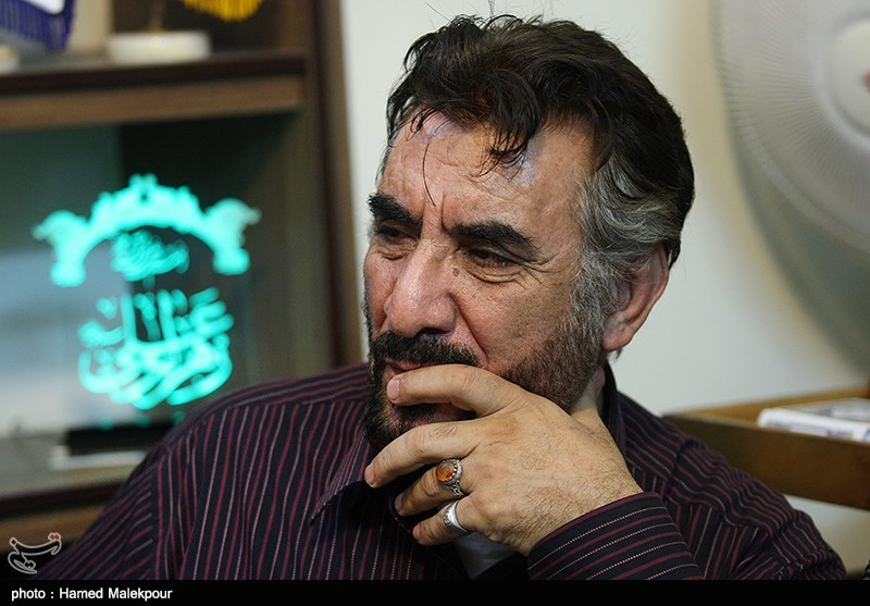 فرج‌الله سلحشور